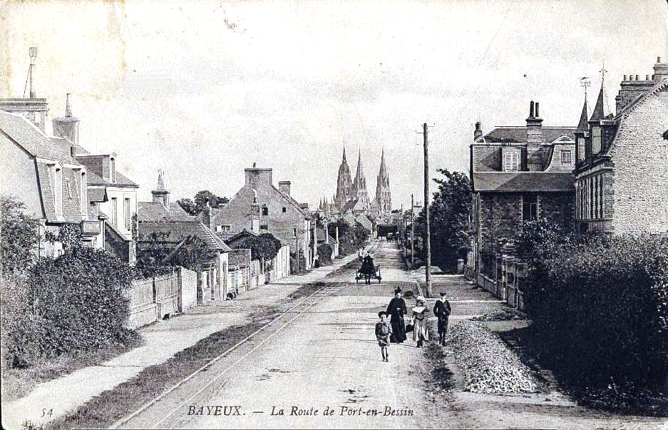 la route de Port-en-Bessin au début du XXe ; sur la bas côté, la ligne des Chemins de fer du Calvados.